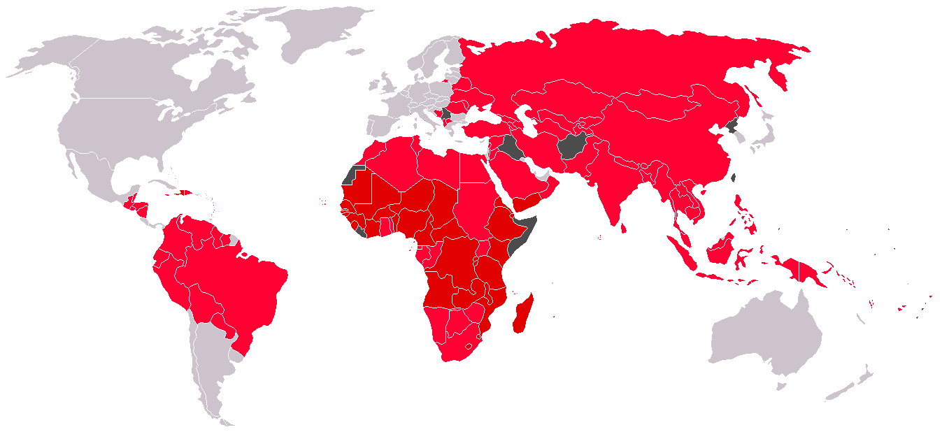 Derde Wereldlanden (landen met midden of laag HDI-niveau.